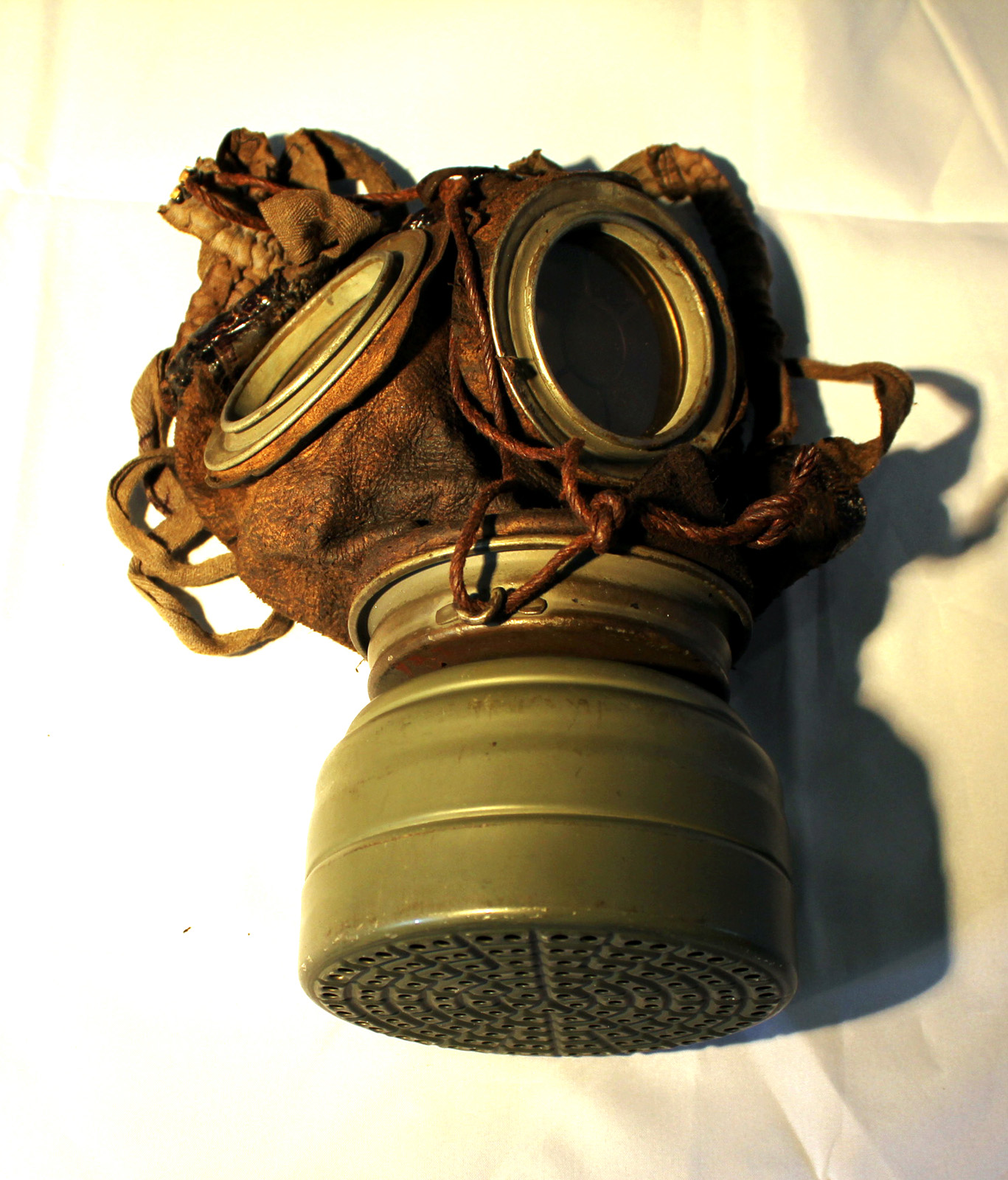 Bilder einer Gasmaske aus dem ersten Weltkrieg. Die Gebrauchsanweisung im Inneren des Helmes ist deutlich zu lesen.